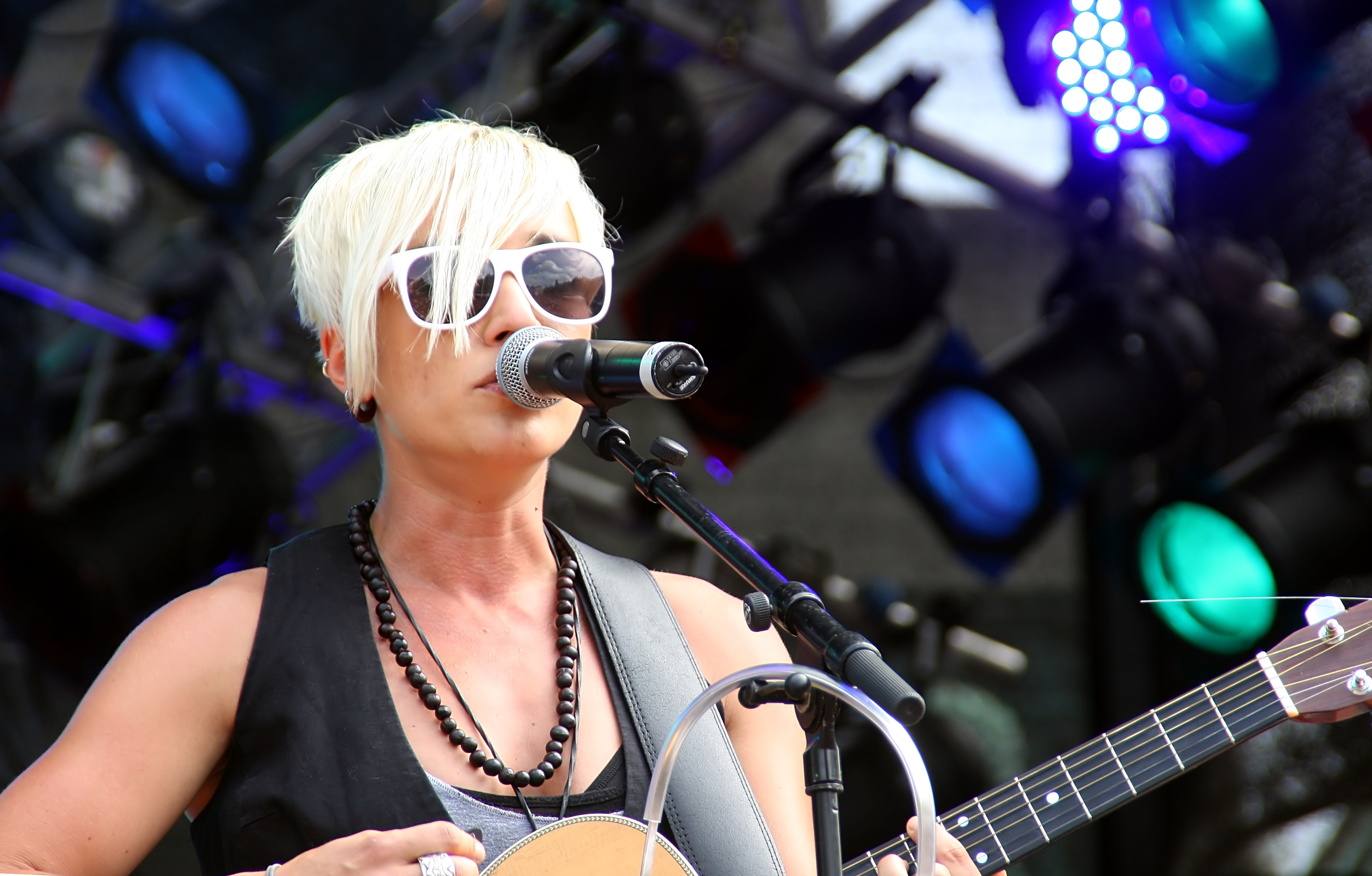 Elli Erl auf der Hauptbühne auf dem Heumarkt, Köln. Bühnenprogramm zum CSD-Straßenfest/ColognePride 2009.